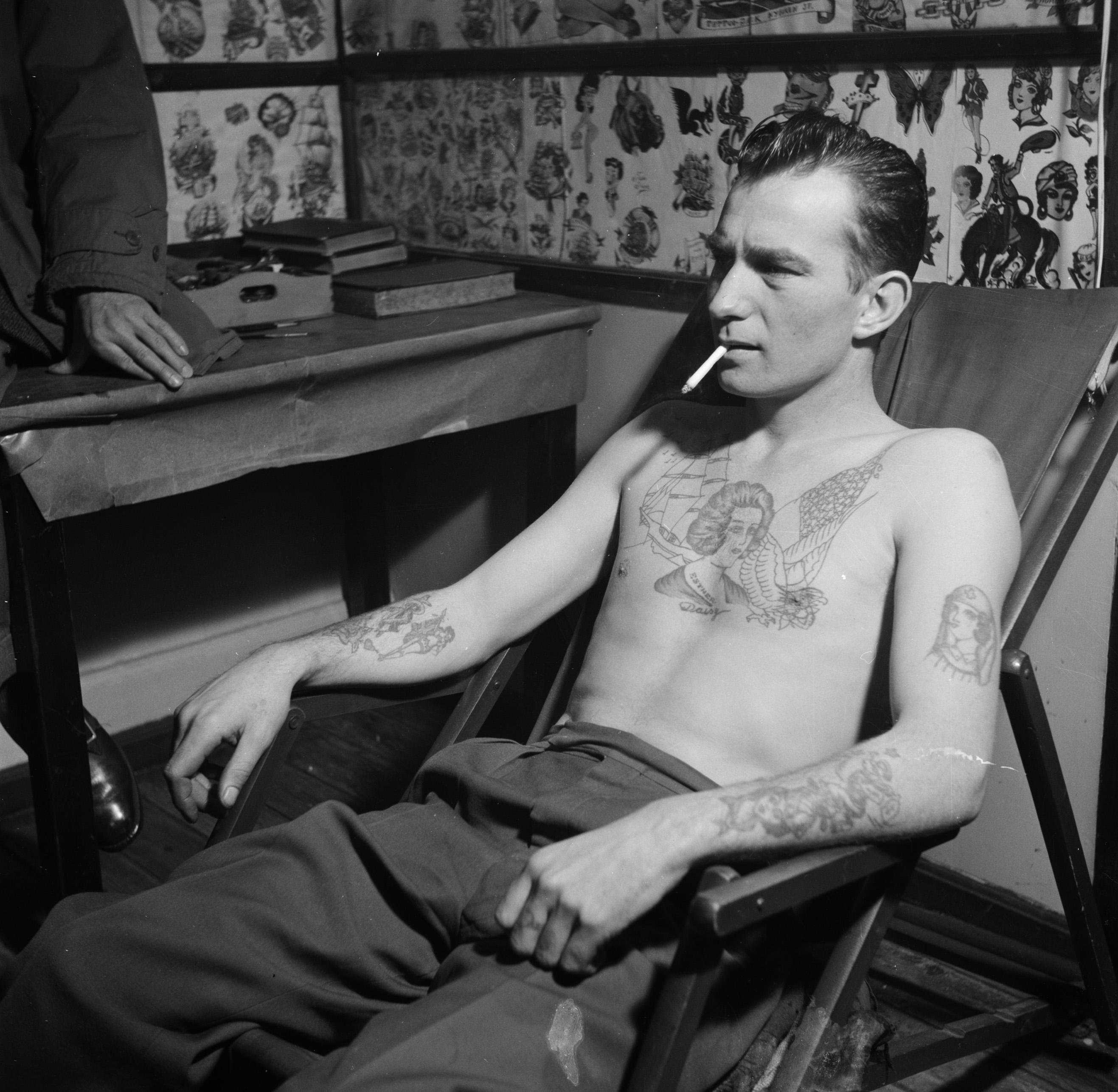 Collectie / Archief : Fotocollectie Van de Poll Reportage / Serie : Bezoek aan een tatoeage winkel in Kopenhagen Beschrijving : Man poseert met tatoeages gezet door tatoeëerder Jack Datum : maart 1954 Locatie : Denemarken, Kopenhagen, Nyhavn Trefwoorden : gebouwen, mannen, tatoeages, tekeningen, winkels Fotograaf : Poll, Willem van de, [onbekend] Auteursrechthebbende : Nationaal Archief Materiaalsoort : Negatief (zwart/wit) Nummer archiefinventaris : bekijk toegang 2.24.14.02 Bestanddeelnummer : 252-9246